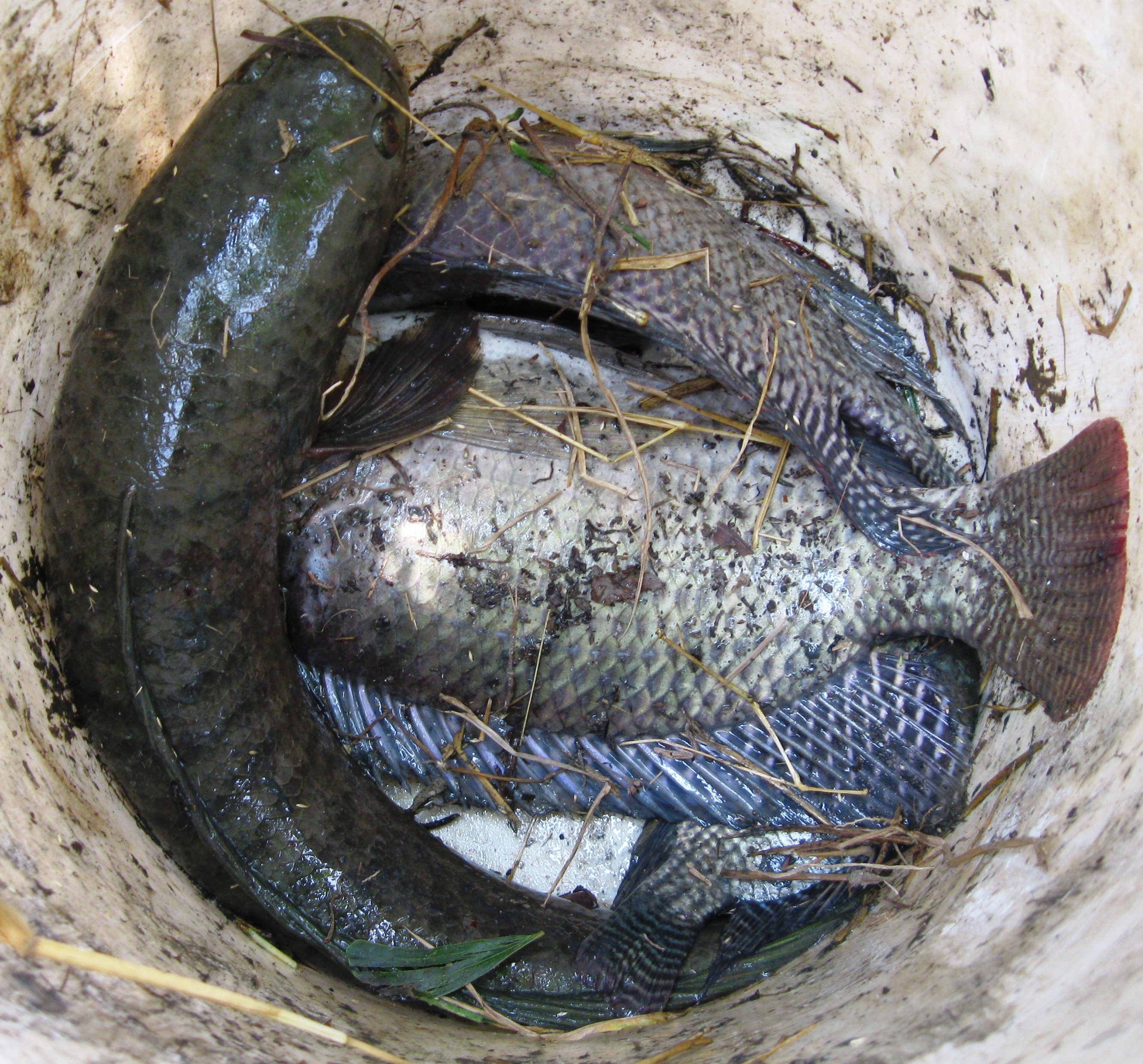 Hình chụp bằng máy ảnh cá nhân về cá lóc Việt Nam bắt được ở Long An, cùng với cá rô đồng